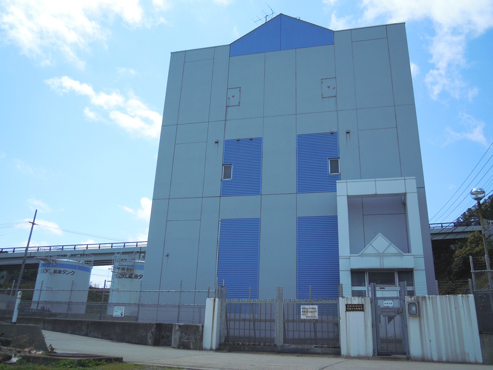 山形県酒田市飛島にある東北電力飛島火力発電所